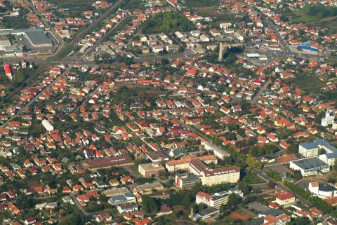 Mátészalka, Hungary, aerialphotgraphy